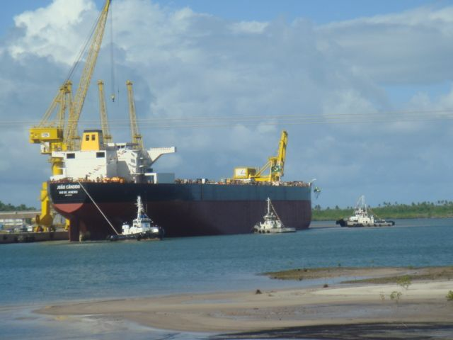 Navio João Cândido